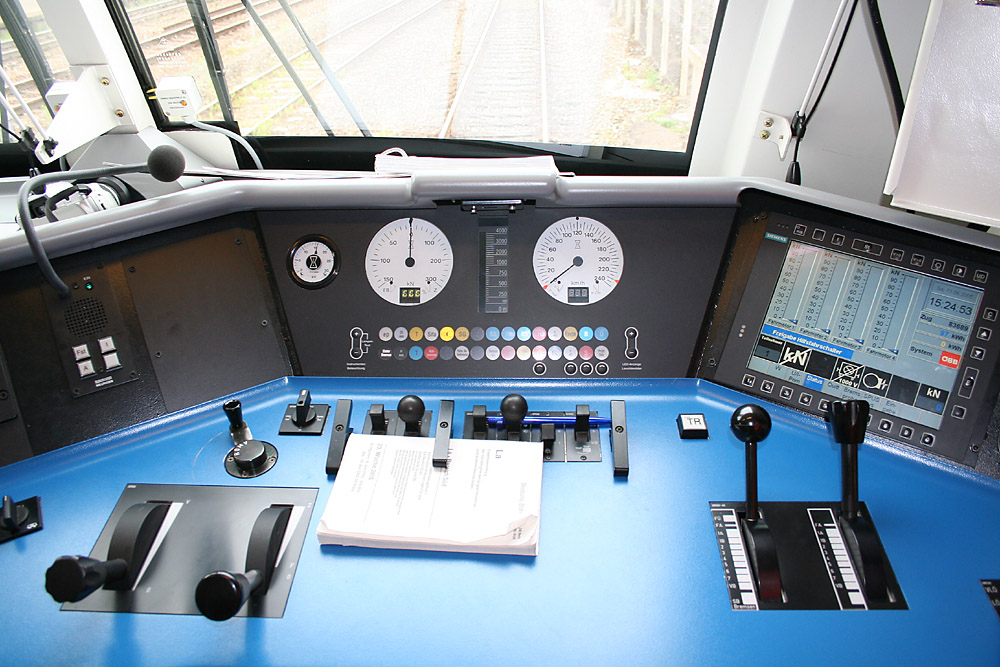 Führerstand einer Taurus-Lokomotive der Bauart ES 64 U2